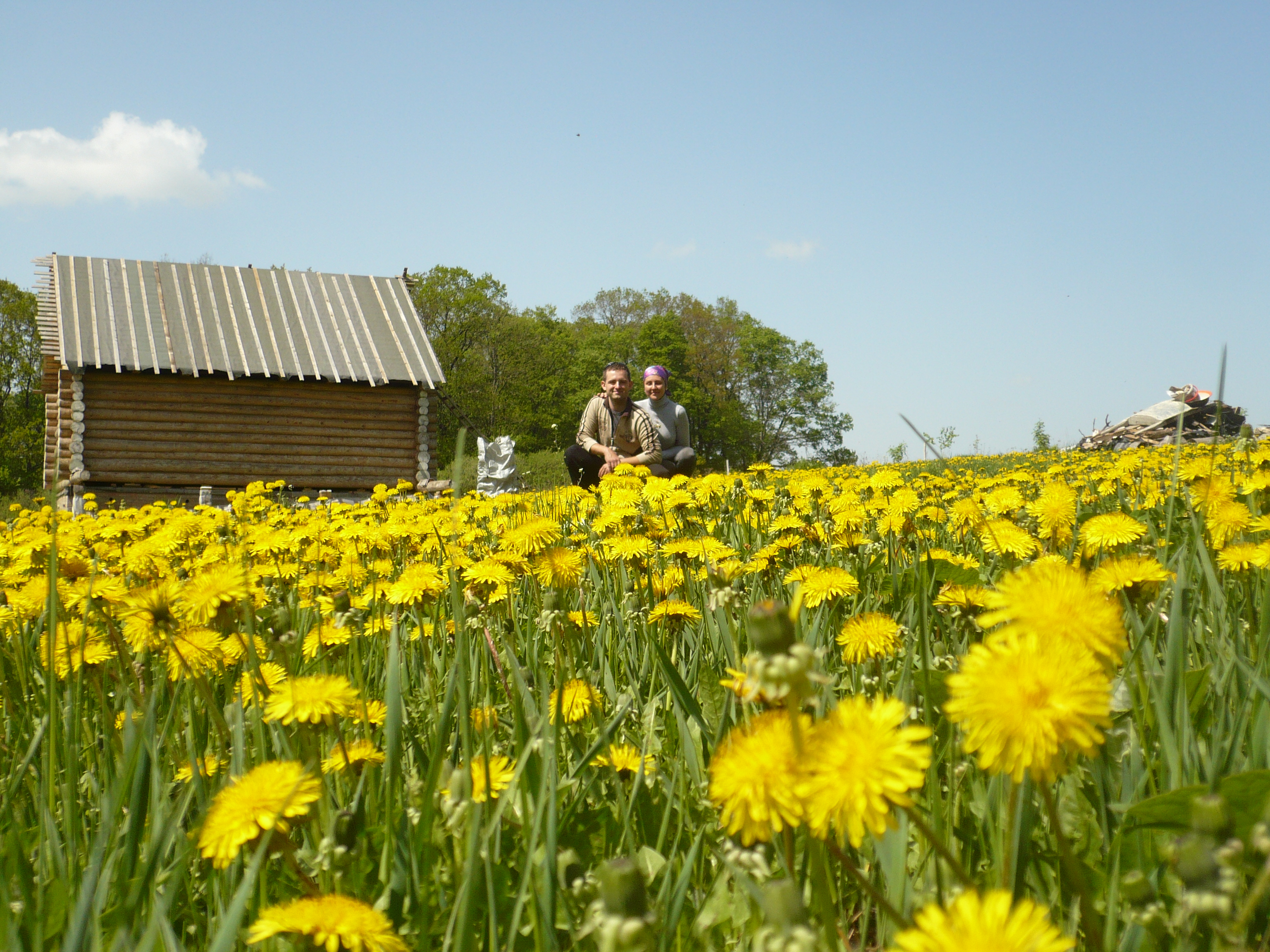 Дом среди одуванчиков